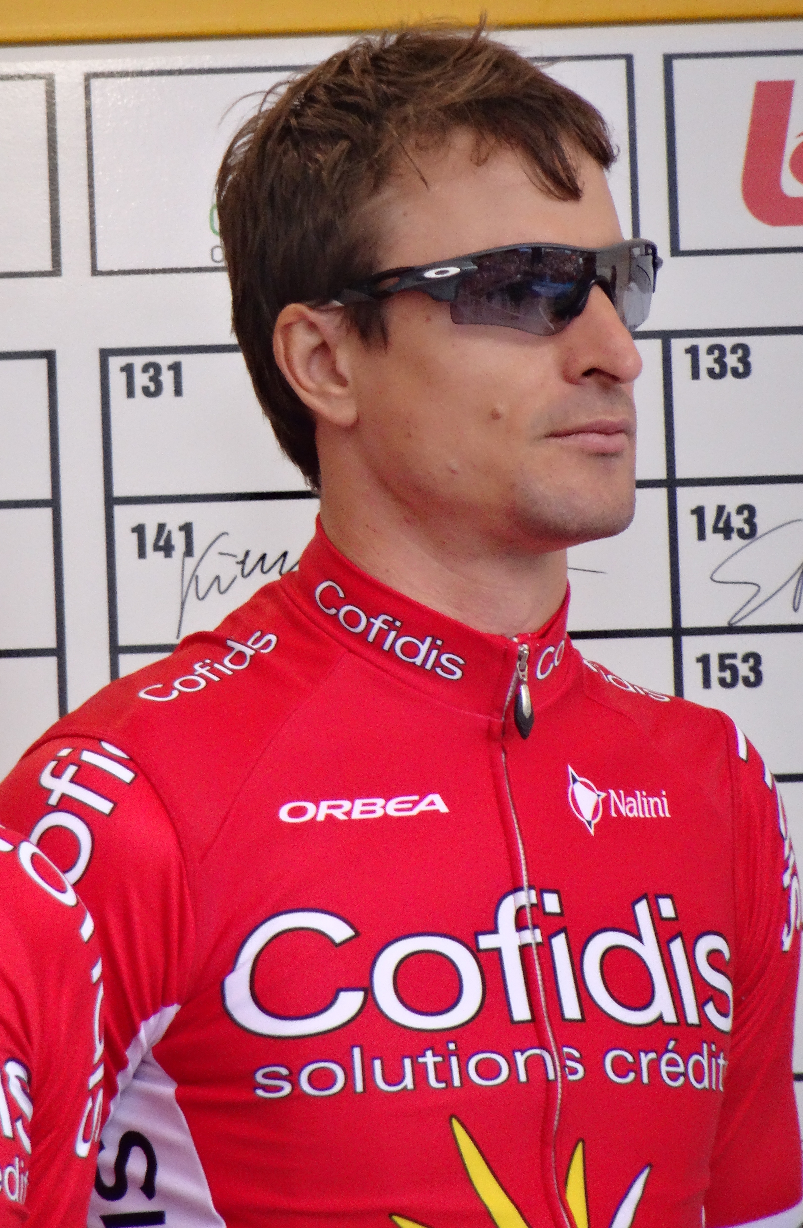 Reportage réalisé le dimanche 1er mars à l'occasion du départ et de l'arrivée de Kuurne-Bruxelles-Kuurne 2015 à Kuurne, Belgique.